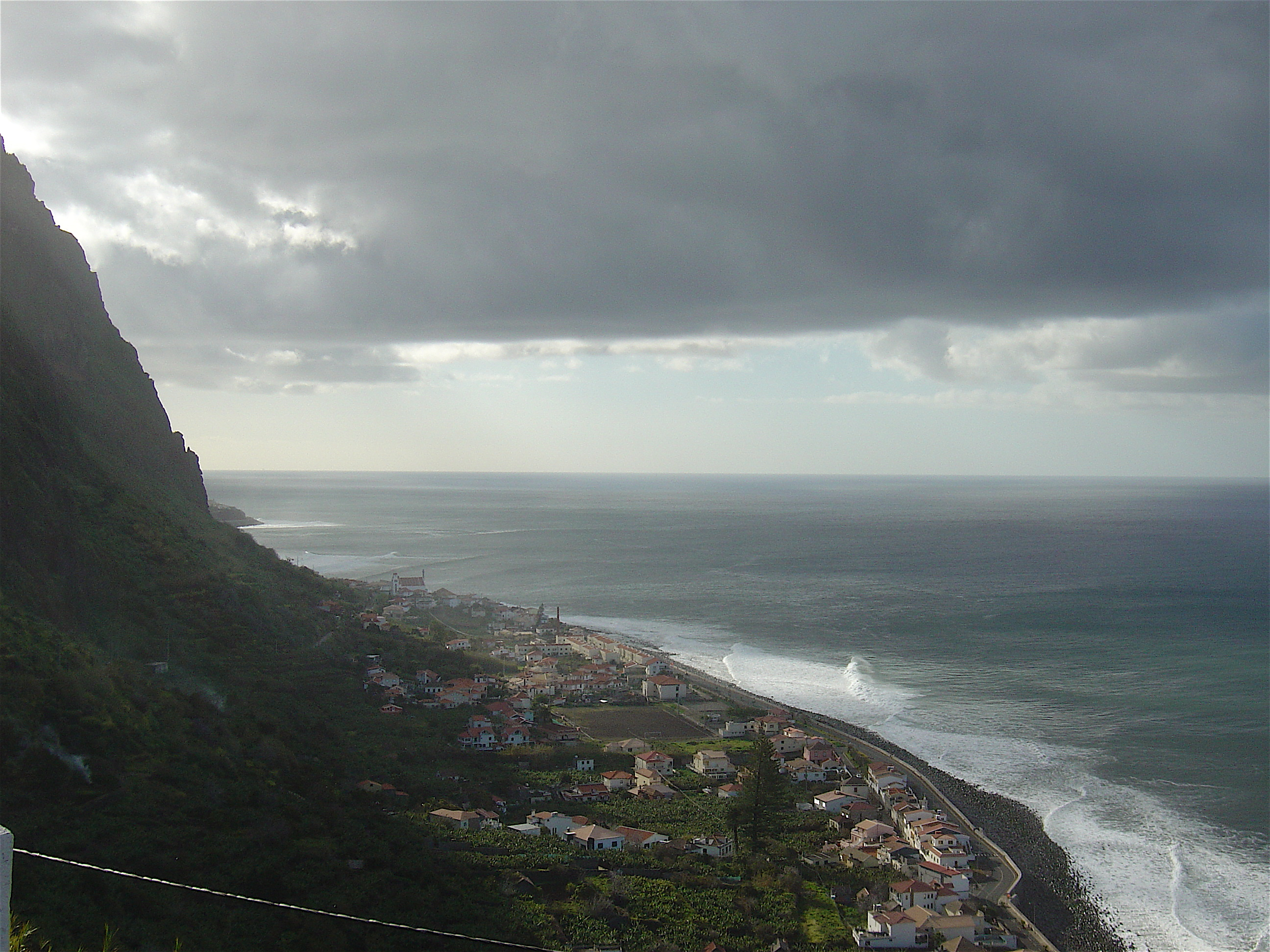 Blick auf das Küstendorf Paul do Mar im Nordwesten von Madeira